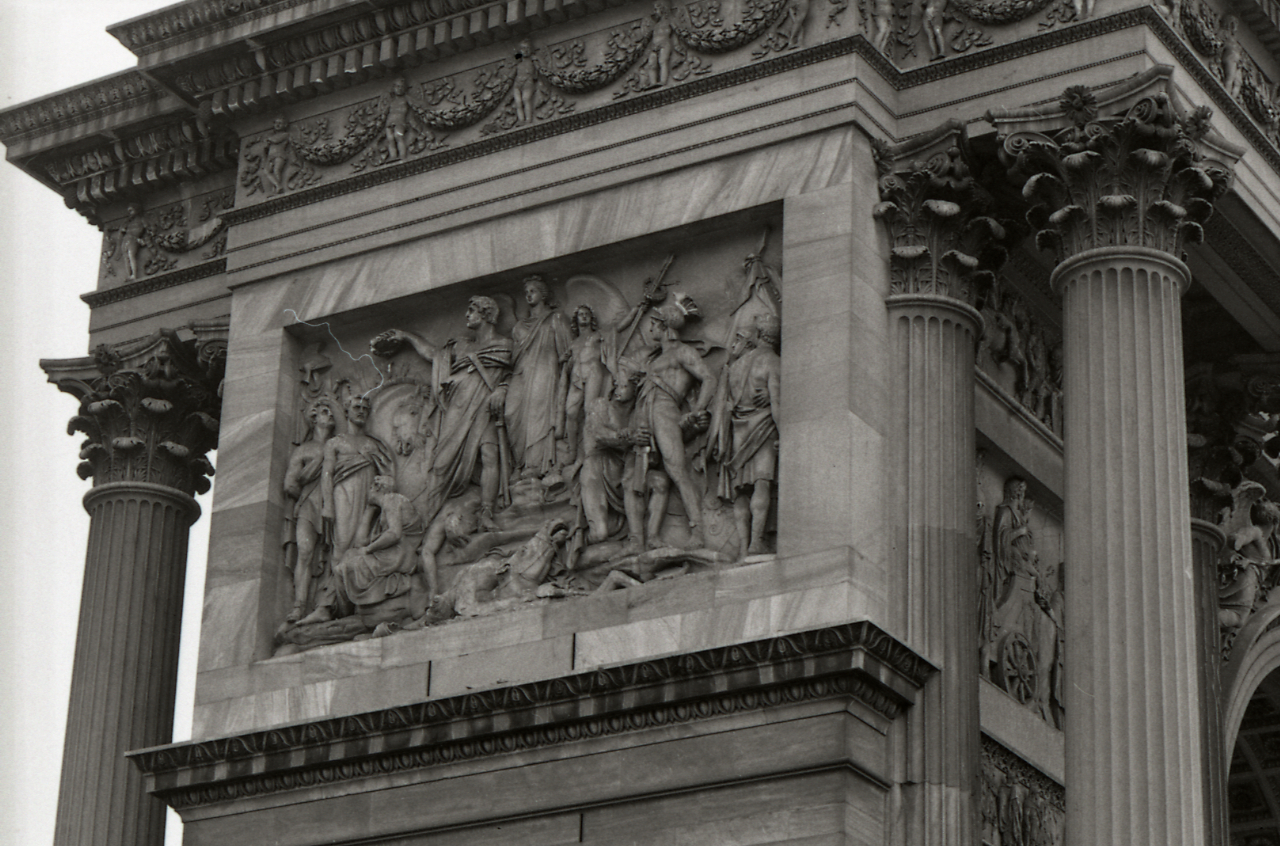 Bassorilievo "La vittoria di Lipsia" opera di Pompeo Marchesi (1783-1858): E' collocato sul fianco sinistro dell'Arco della Pace. Serie fotografica : Milano, 1972 / Paolo Monti. - Strisce: 4, Fotogrammi complessivi: 24 : Negativo b/n, gelatina bromuro d'argento/ pellicola ; 35 mm. - ((Sul portanegativi: NIKON FP4. - (2):. - 13A-12A = decorazioni scultoree dell'Arco della Pace?. - 33A-36A = paracarro. - Sulla faccia interna del portanegativi in corrispondenza dei relativi fotogrammi manoscritte indicazioni tecniche di ripresa (focale, tempi di esposizione, apertura di diaframma). - Occasione: Prove. - Fonte: Agenda di Paolo Monti: Leica 1501-3000 Controllo numerazione (1950-1978), presso Archivio Paolo Monti. - Fonte: Agenda di Paolo Monti: Monti - Agenda 1972 (1972), presso Archivio Paolo Monti